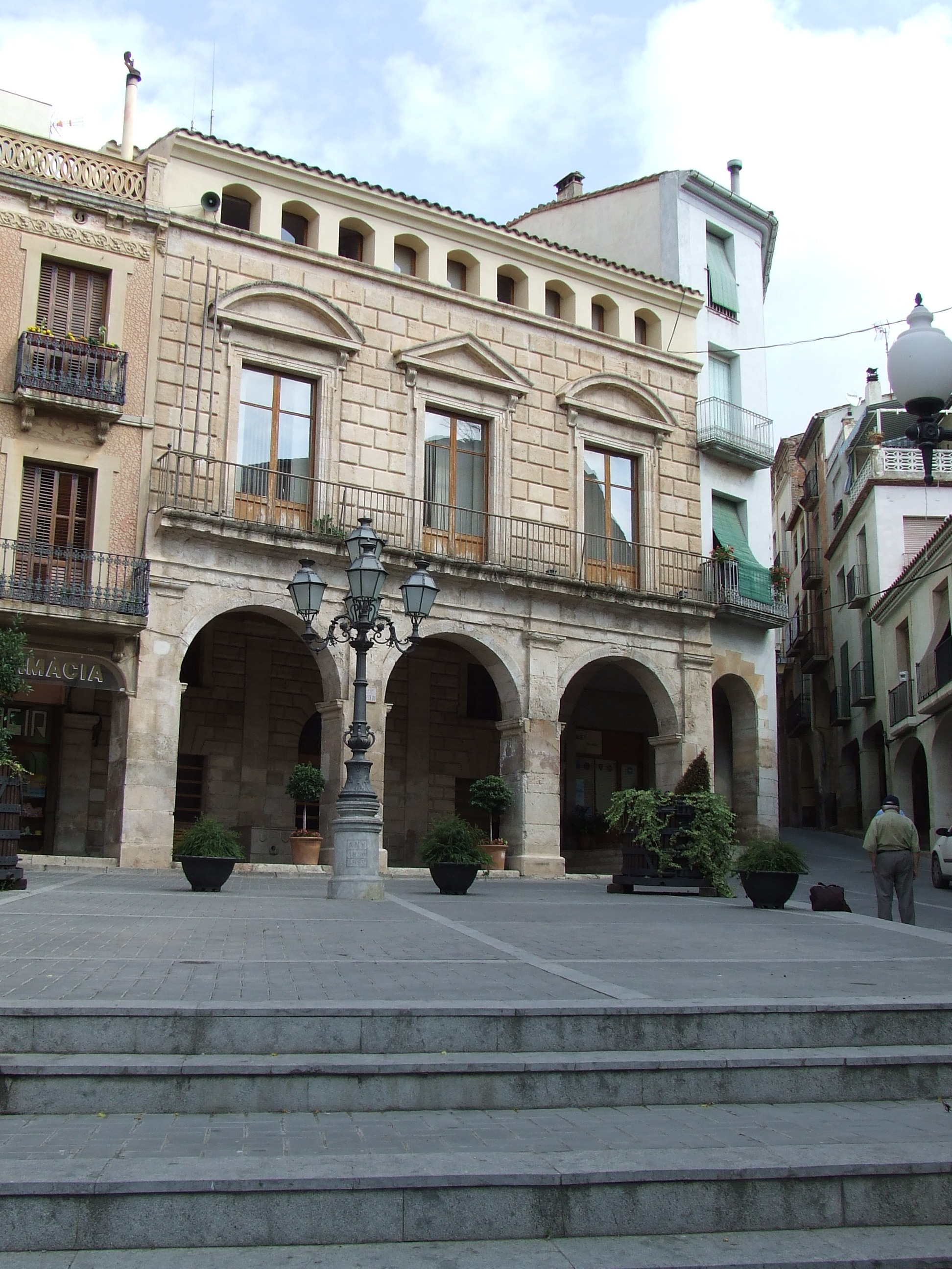 Casa de la Vila de Falset.